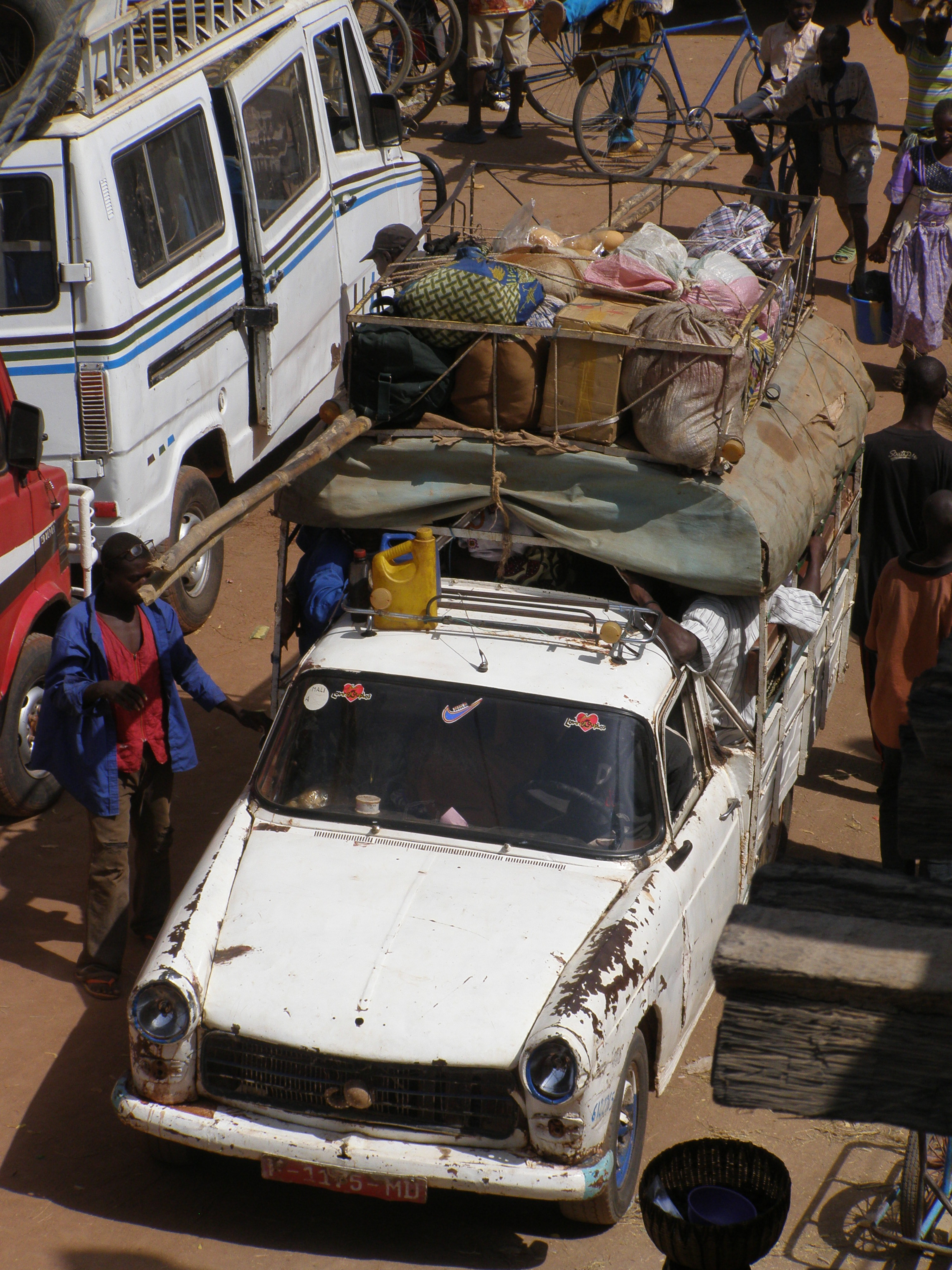 Pick-up Peugeot 404 au marché de Djenné - Mali